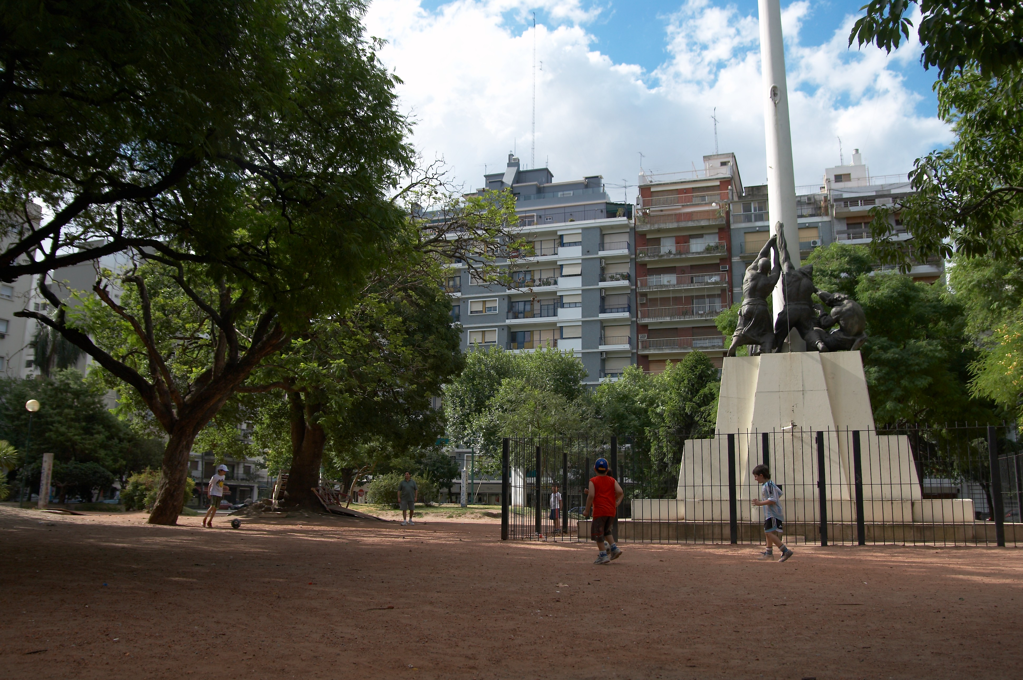 Estatua en homenaje a las madres, Plaza Colombia, barrio de Barracas, Buenos Aires, Argentina.